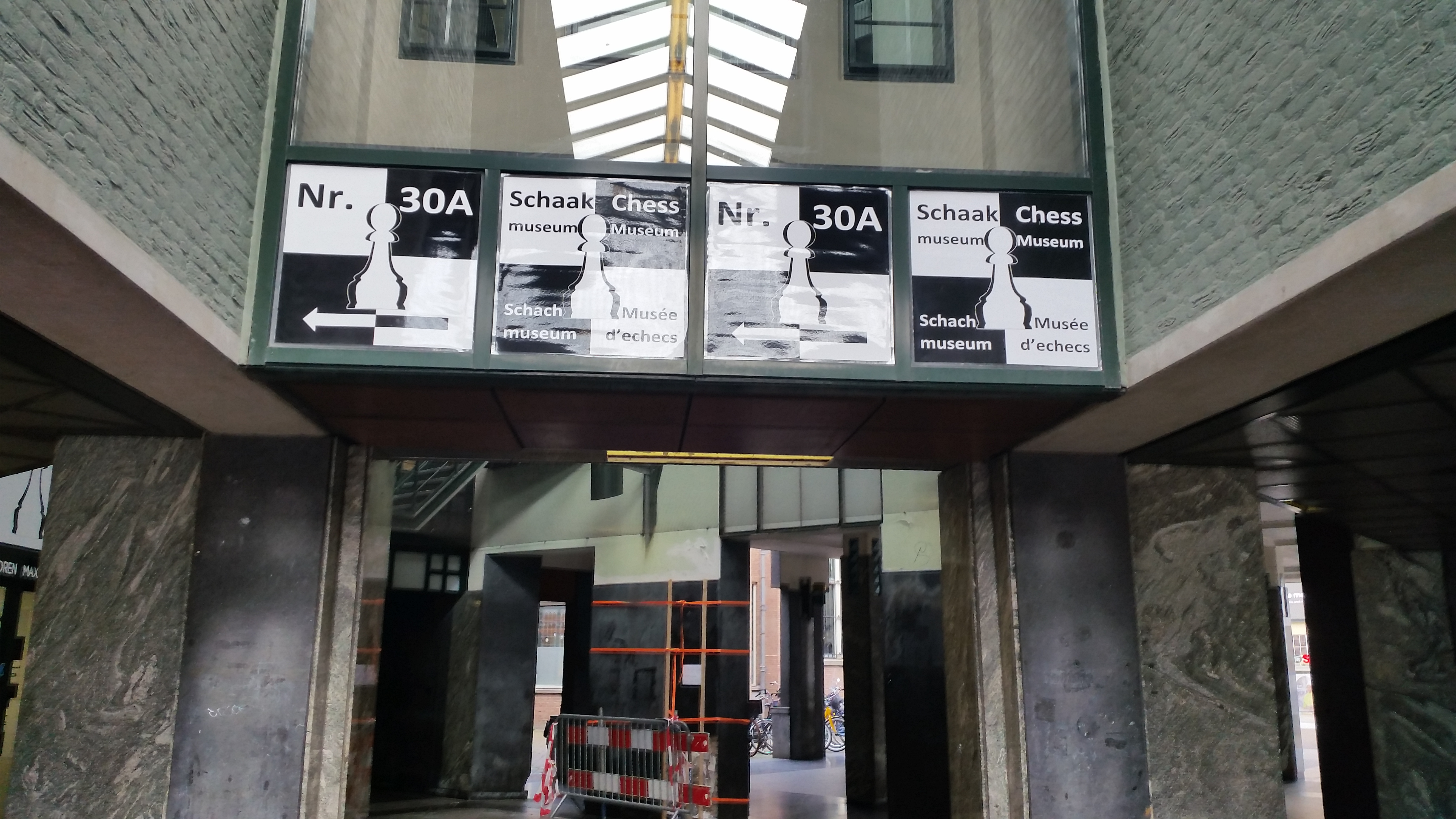 Toegang Max Euwe Museum aan het Max Euweplein, Amsterdam